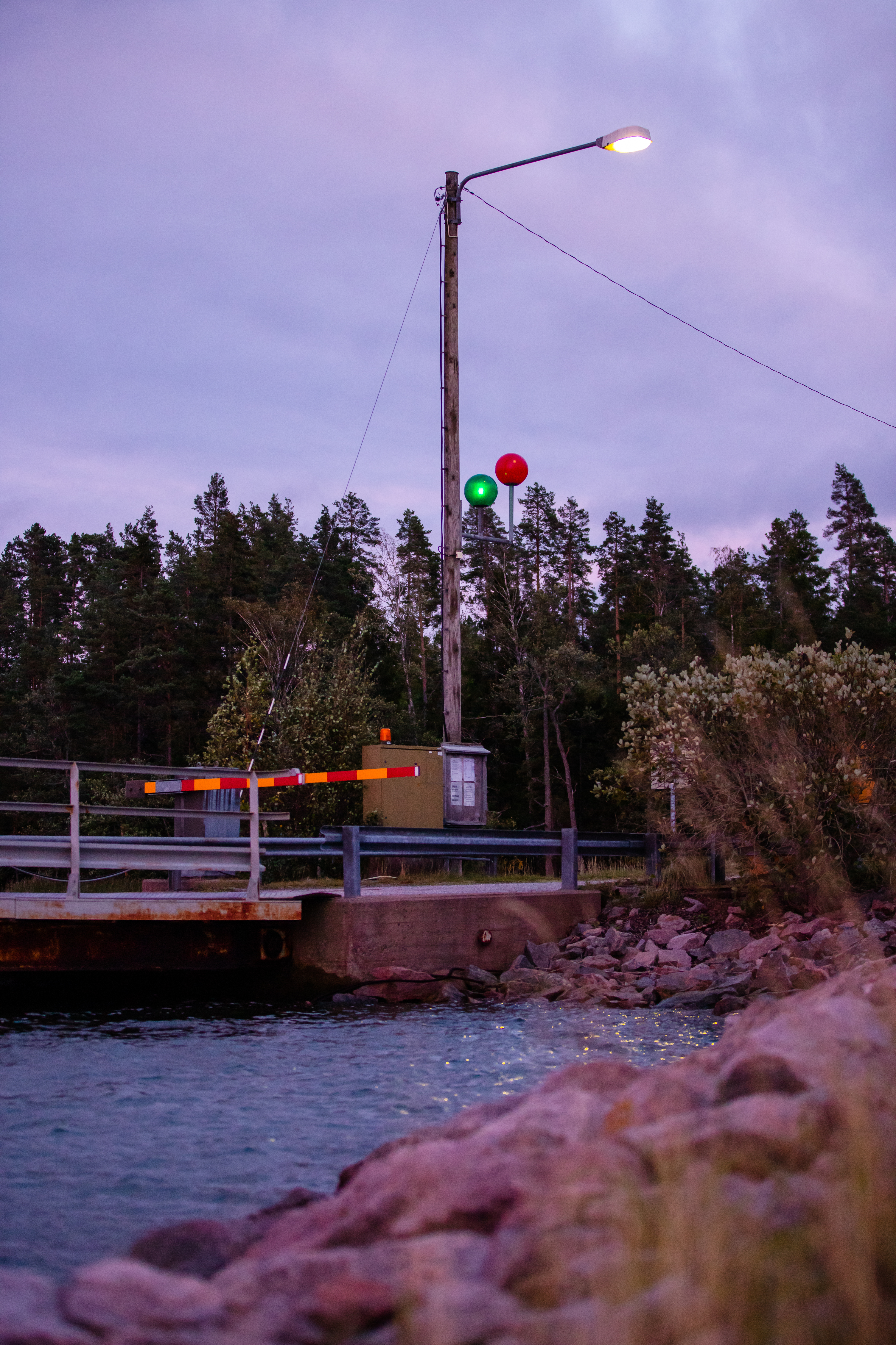 Nagu Käldö färjfäste